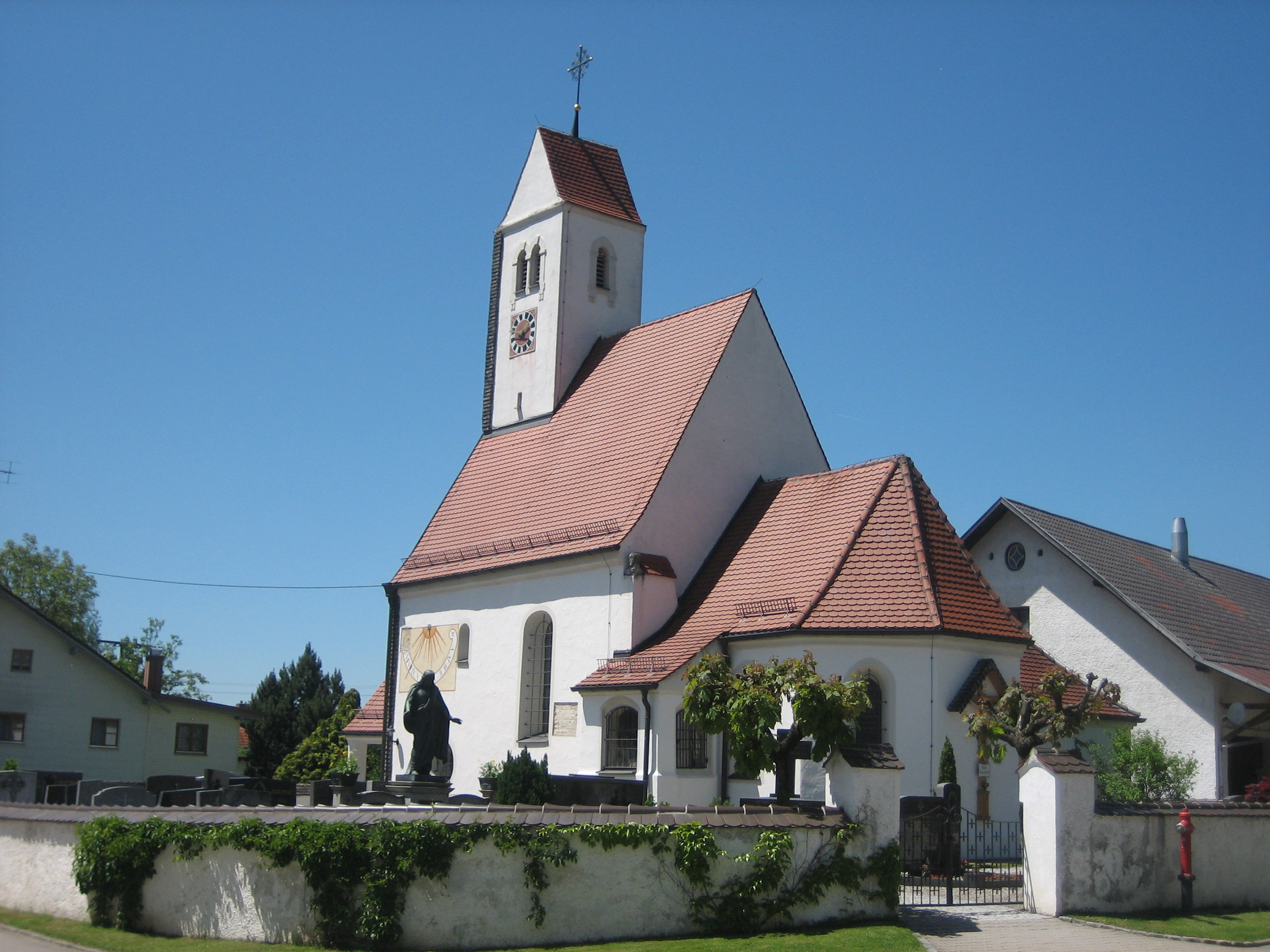 Kapelle Dietratried